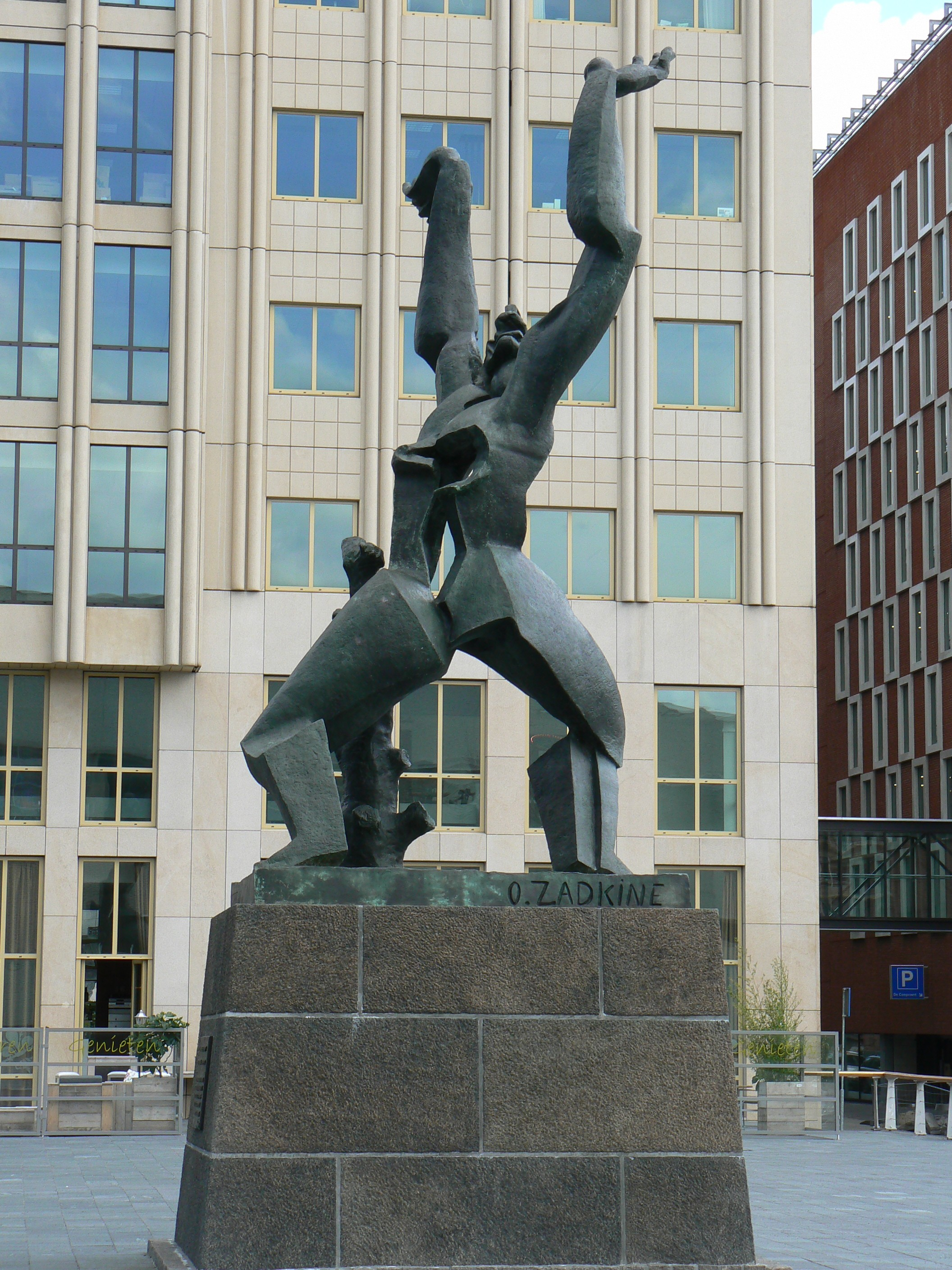 De Verwoeste Stad in Rotterdam/The Netherlands